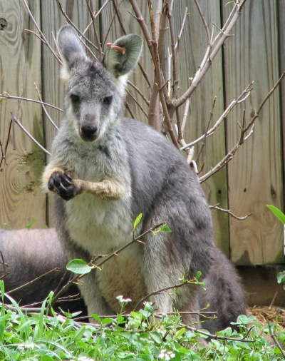 Wallaroo